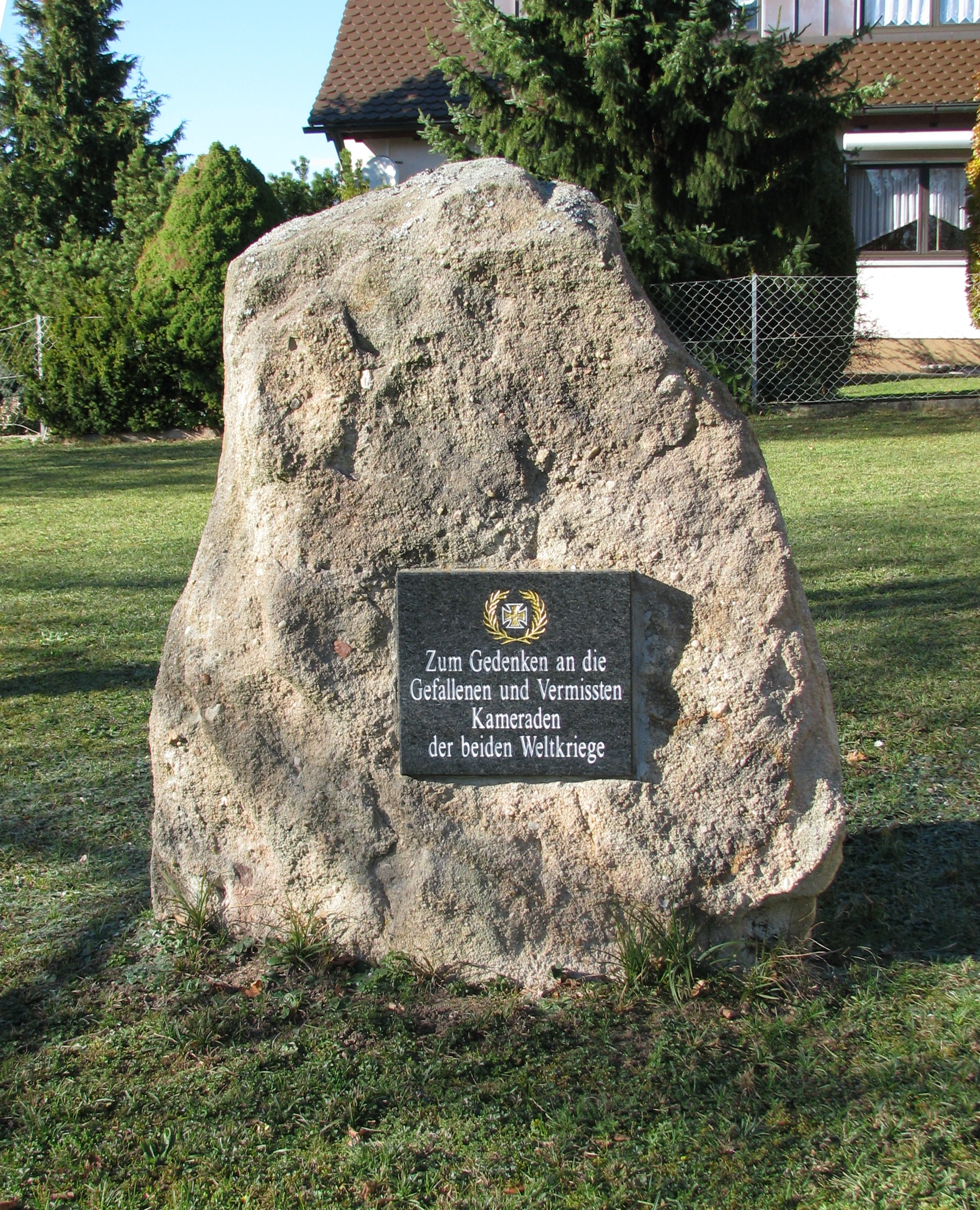 Unterrödel, Ortsteil von Hilpoltstein im mittelfränkischen Landkreis Roth, Gefallenen-Denkmal